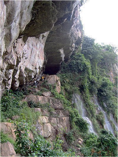 Un étroit sentier permet de longer les surplombs du canyon au milieu des cataractes. Photo prise à Fouta-Djalon.